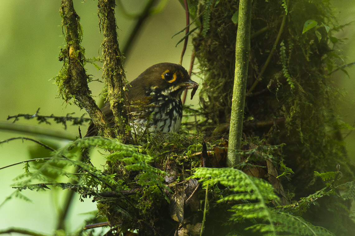 Peruvian antpitta (Grallaricula peruviana) - San Isidro - South Ecuador_S4E3819